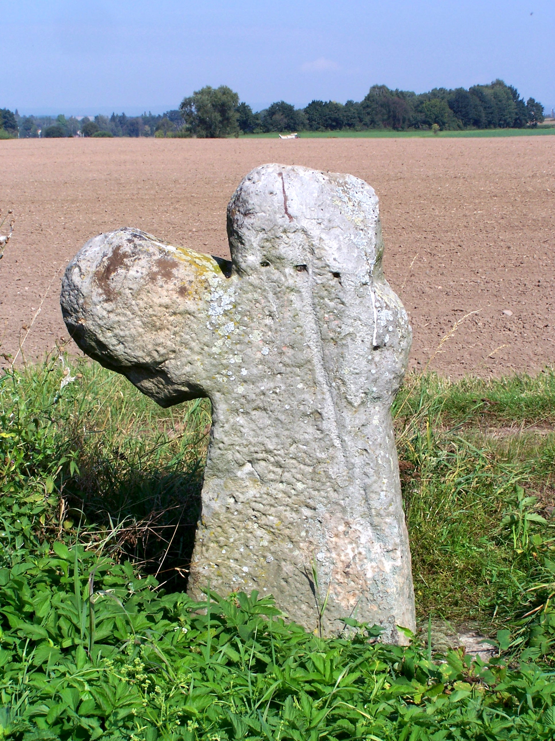 Smírčí kříž (Vlkov)